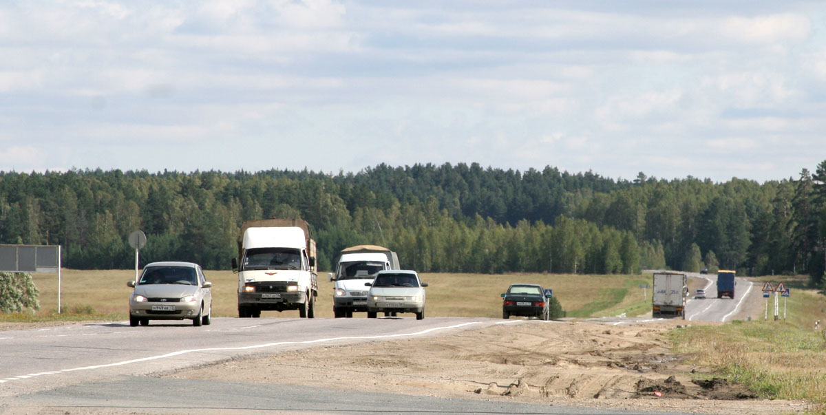 Федеральная трасса Урал у Кузнецка